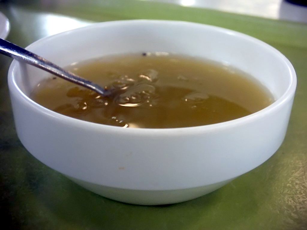 Kaltschale mit Kiwigeschmack